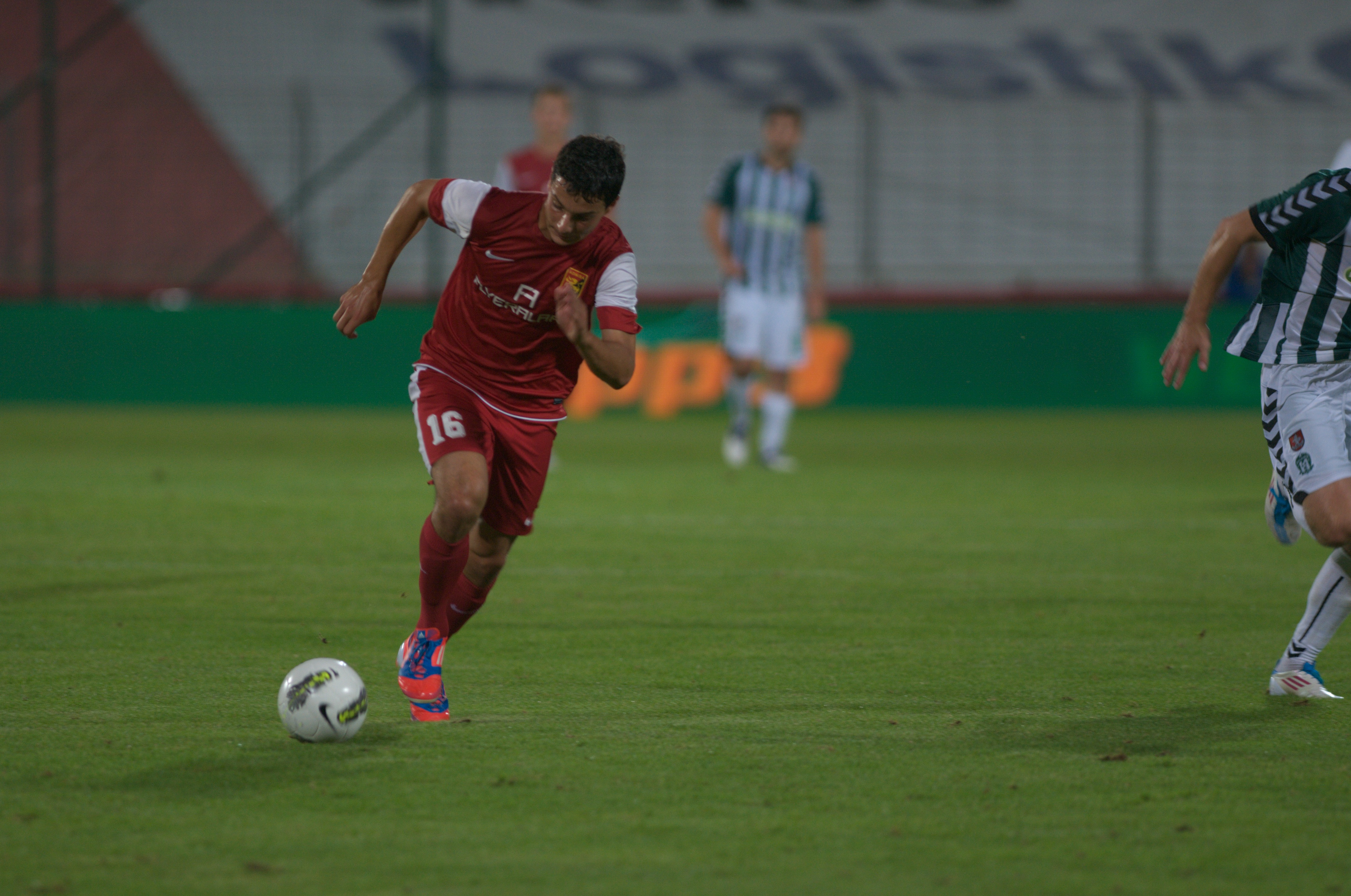 Admira-Spieler Philipp Hosiner beim Europa-League-Qualifikationsspiel gegen Zalgiris